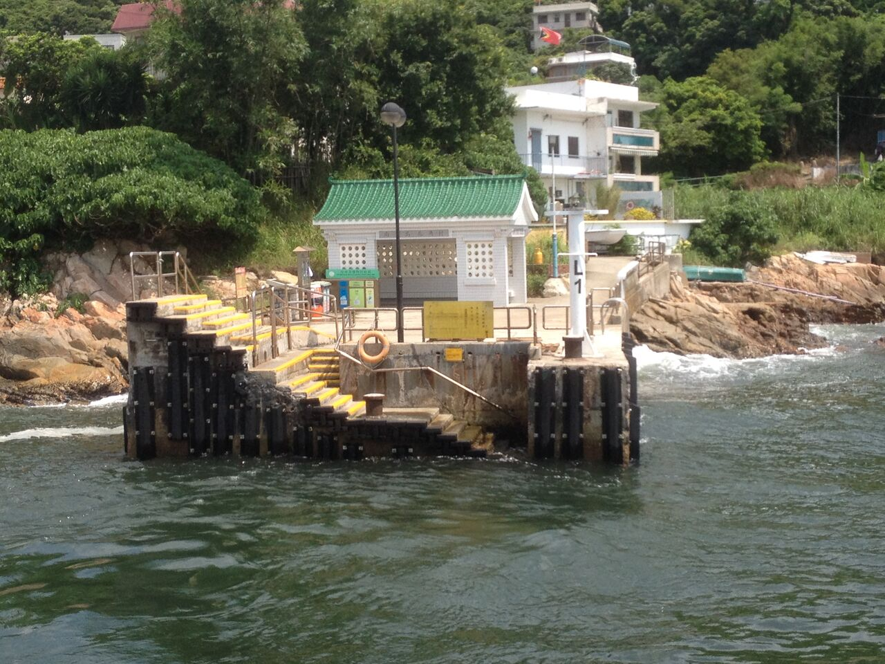 中文（香港）: 南丫島北角碼頭。